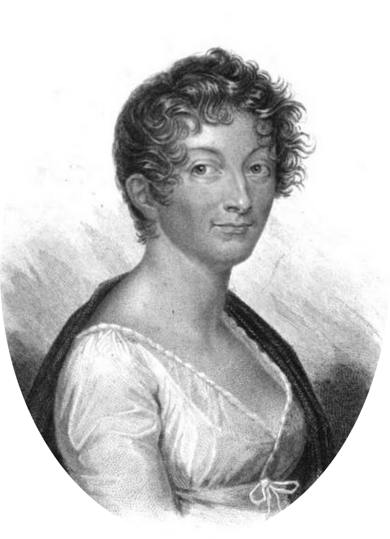 Portrait de Pauline de Meulan dans File:Meulan - Essais de litterature et de morale.djvu